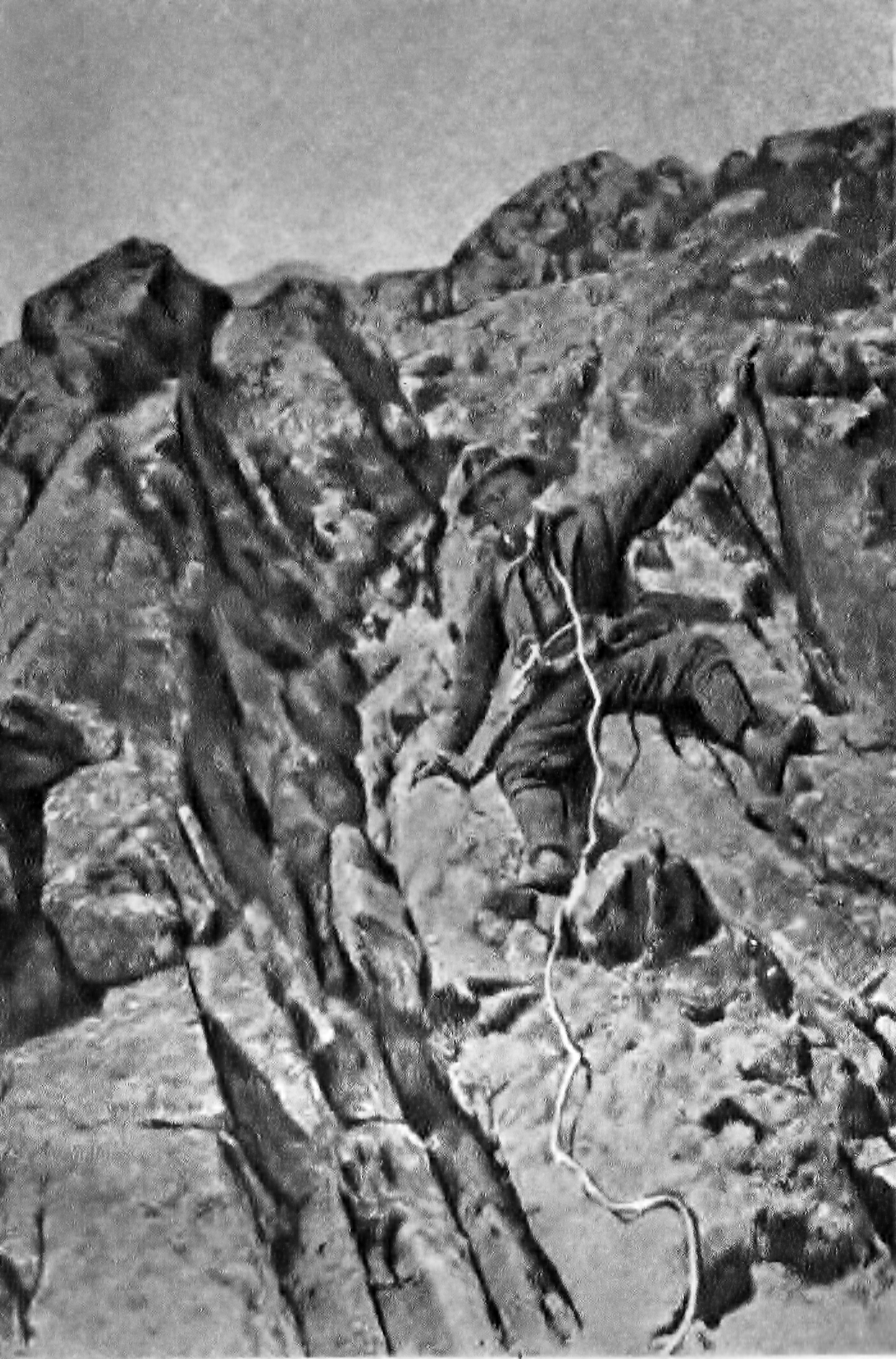 Karol Englisch, JUDr. (* 13. júl 1881 Krakov - † 13. apríl 1945 Stein a. d. Donau), tiež Karl Artur Ritter von English-Payne, bol poľský horolezec, ktorý zdolal v Tatrách množstvo panenských vrcholov a veží.